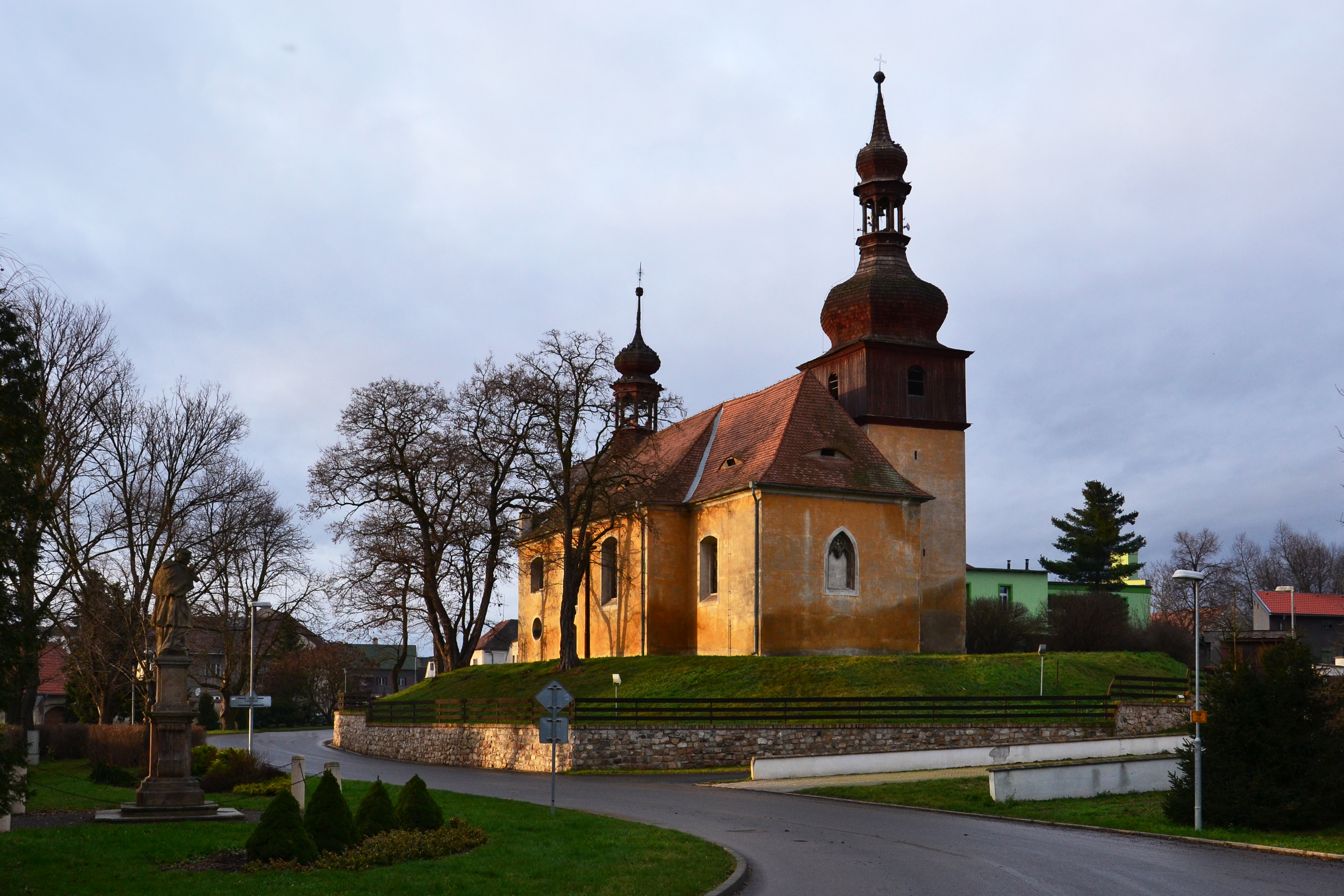 Celkový pohled z jihovýchodu na kostel svatého Václava, Strupčice.